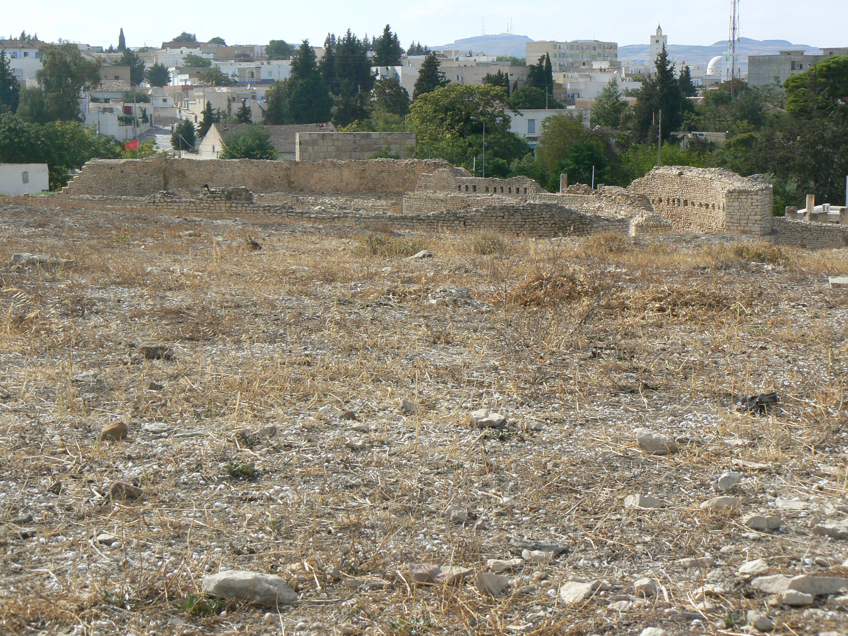 Vue de la ville de Makthar depuis le parc archéologique, à proximité de l'amphithéâtre.